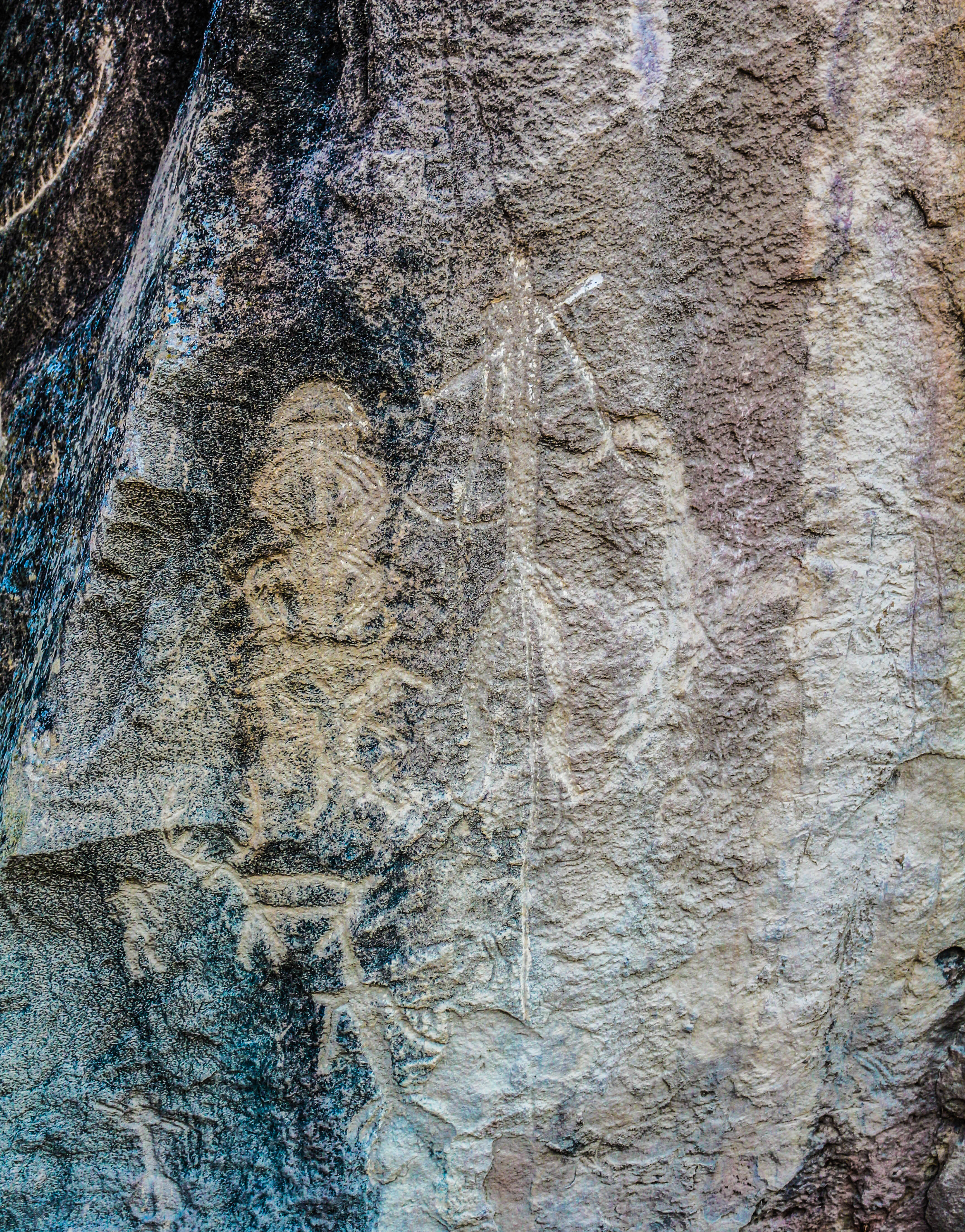 Qayaüstü təsvirlər (çoxlu kişi, qadın), Kiçikdaş dağının ovalıq hissəsi, 49b nömrəli daş, daş dövrü, mezolit, eneolit dövrü